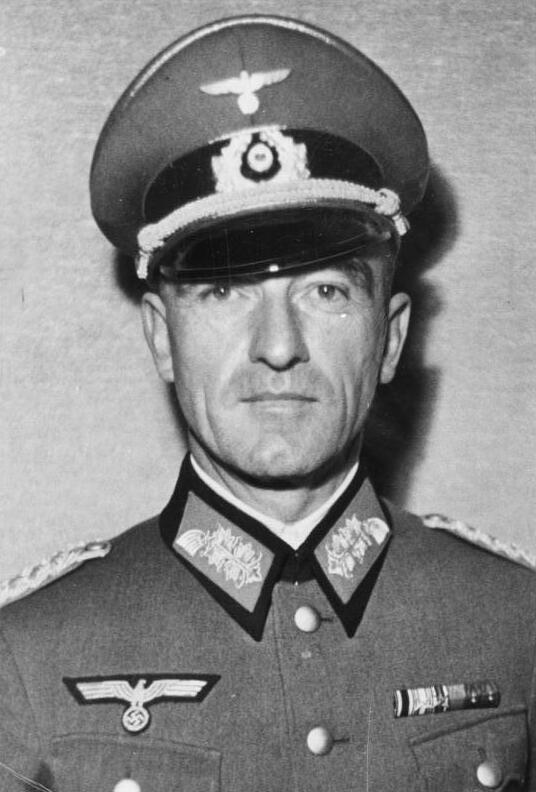 Generalmajor Eugen Müller wurde anStelle des aus dem aktiven Wehrdienst ausgeschiedenen Generals der Infanterie Liebmann vom Führer zum Kommandeur der Kriegsakademie ernannt.